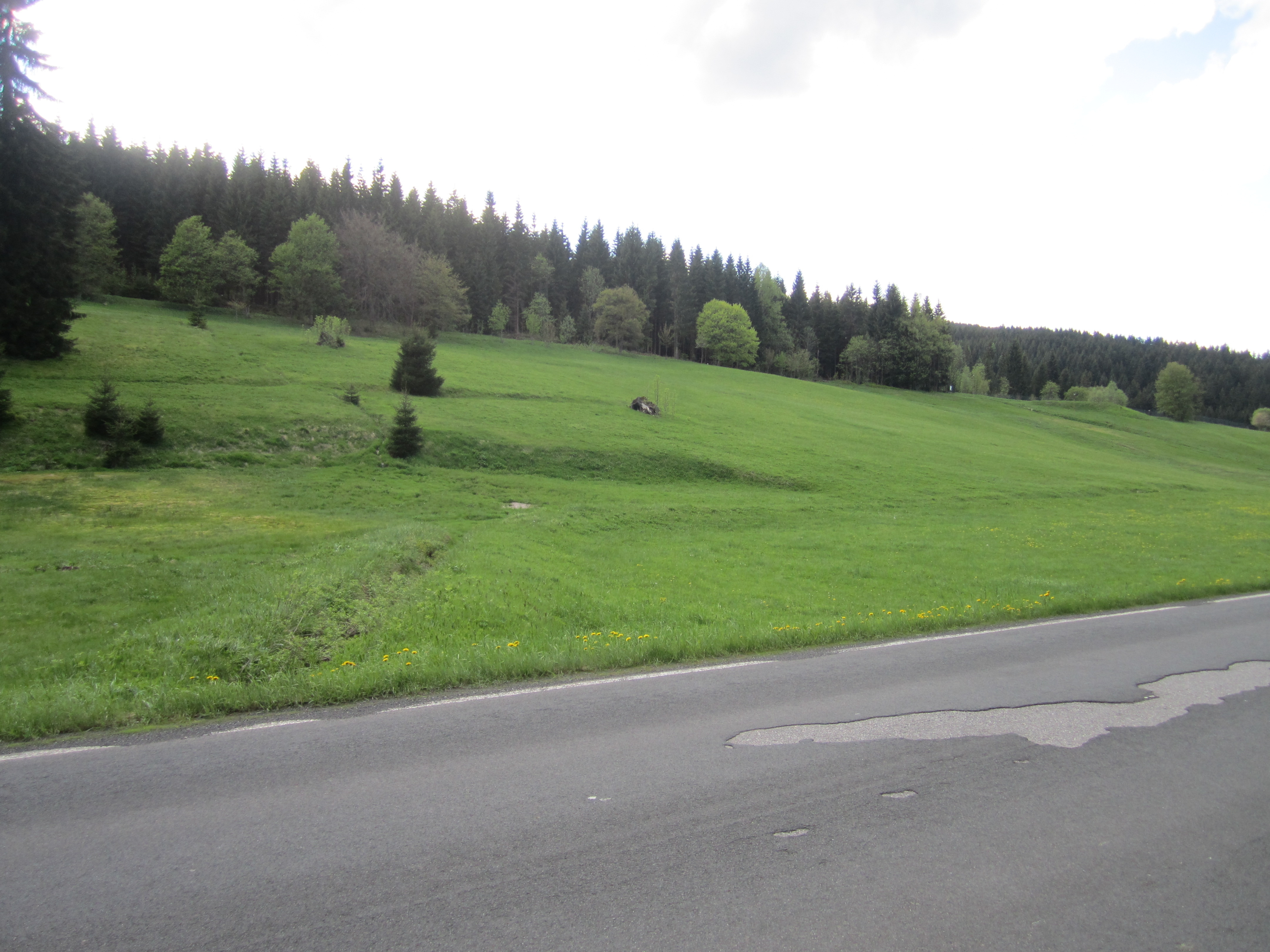 Der Grüner Graben, nach der Querung der Staatsstraße 275.